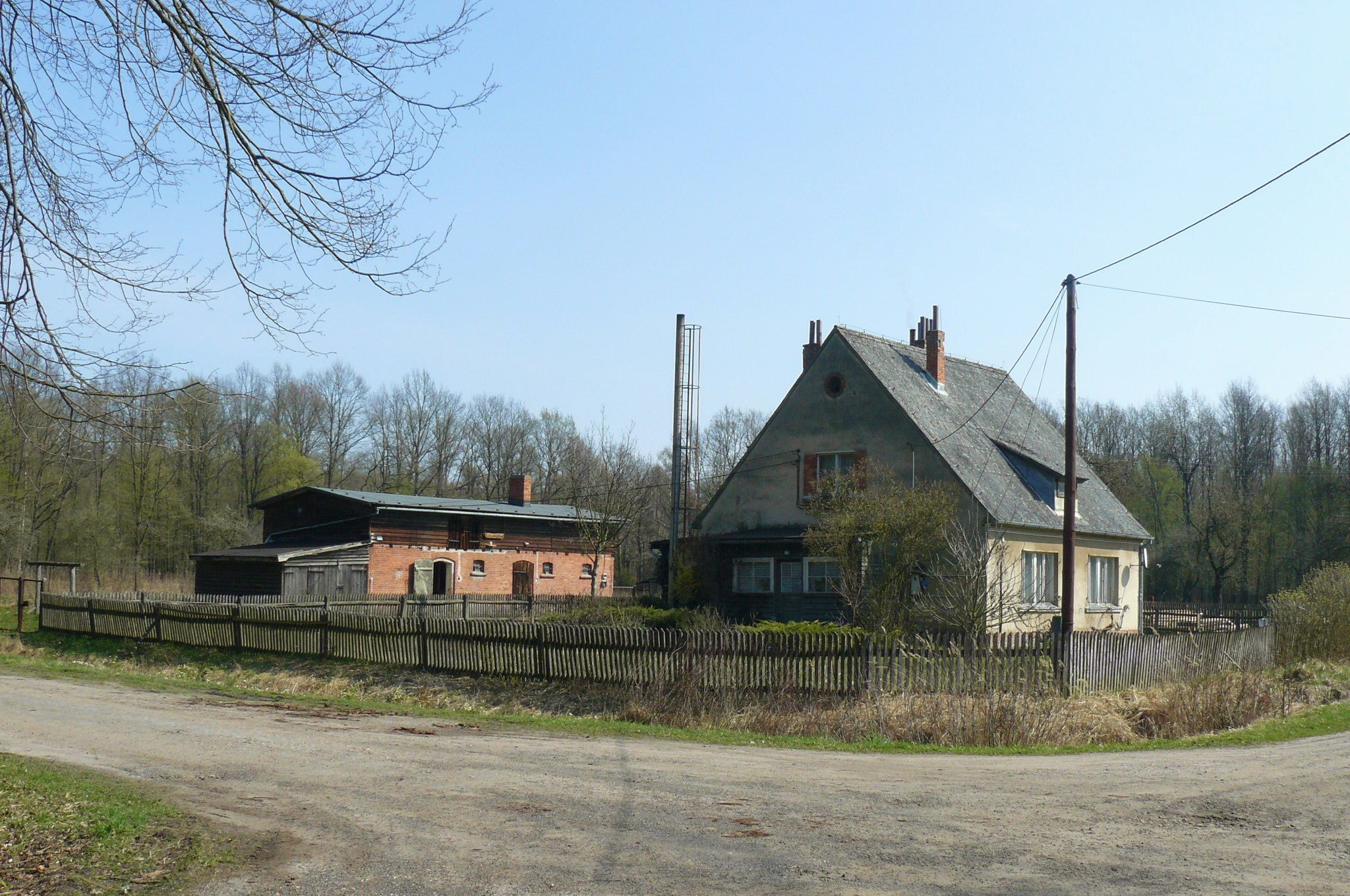 Obszar Chronionego Krajobrazu Dąbrowy Krotoszyńskie i Baszków-Rochy. Kompleks Jasne Pole. Dawna Leśniczówka Dąbrowa.